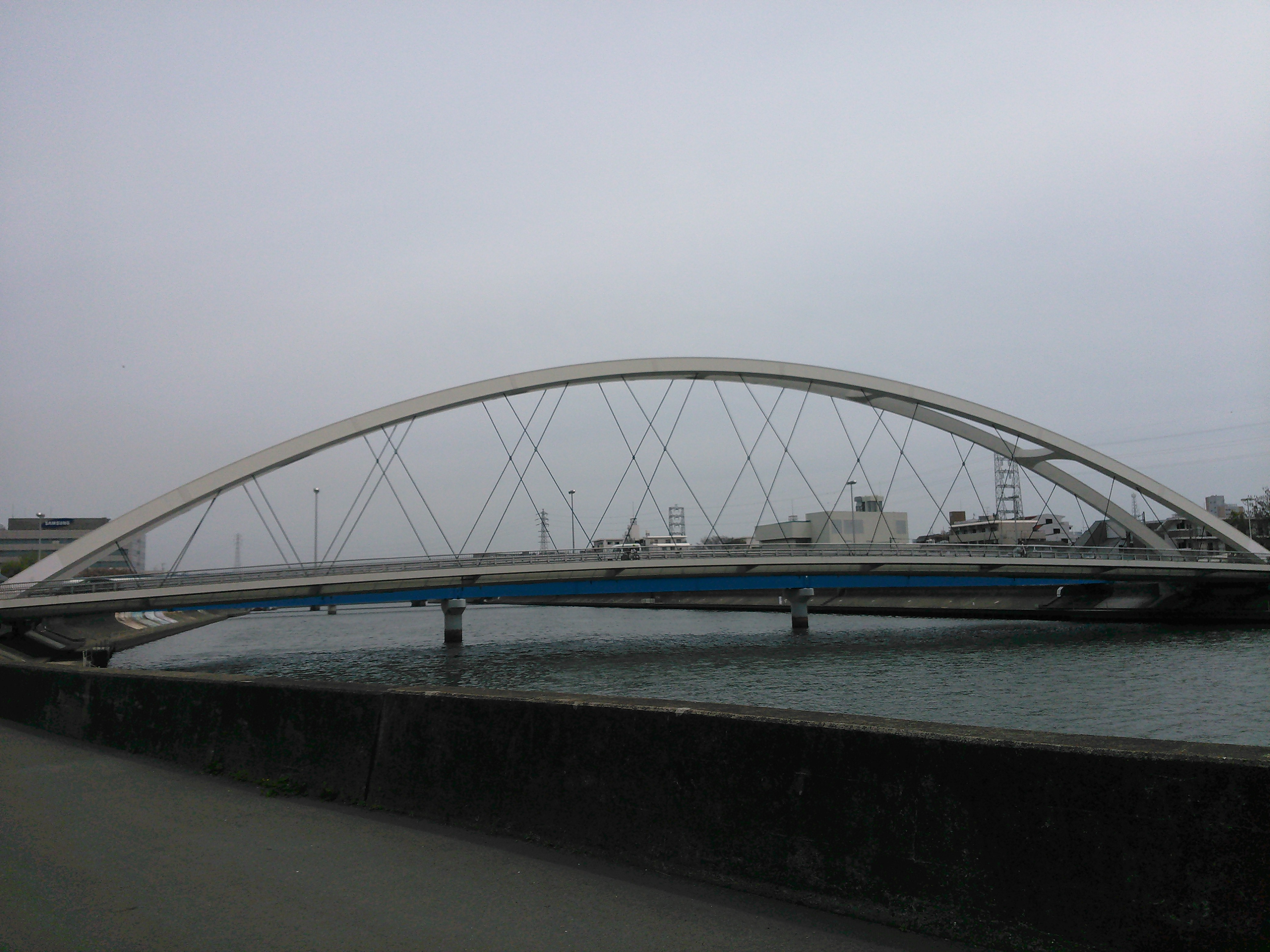 神奈川県横浜市鶴見区、鶴見川橋